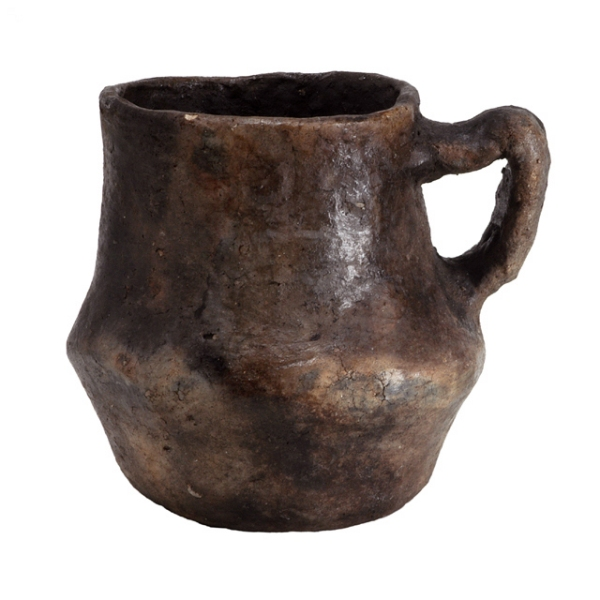 Boccale. Corpo biconico con labbro diritto ed ansa ad orecchio. Colore: grigio.